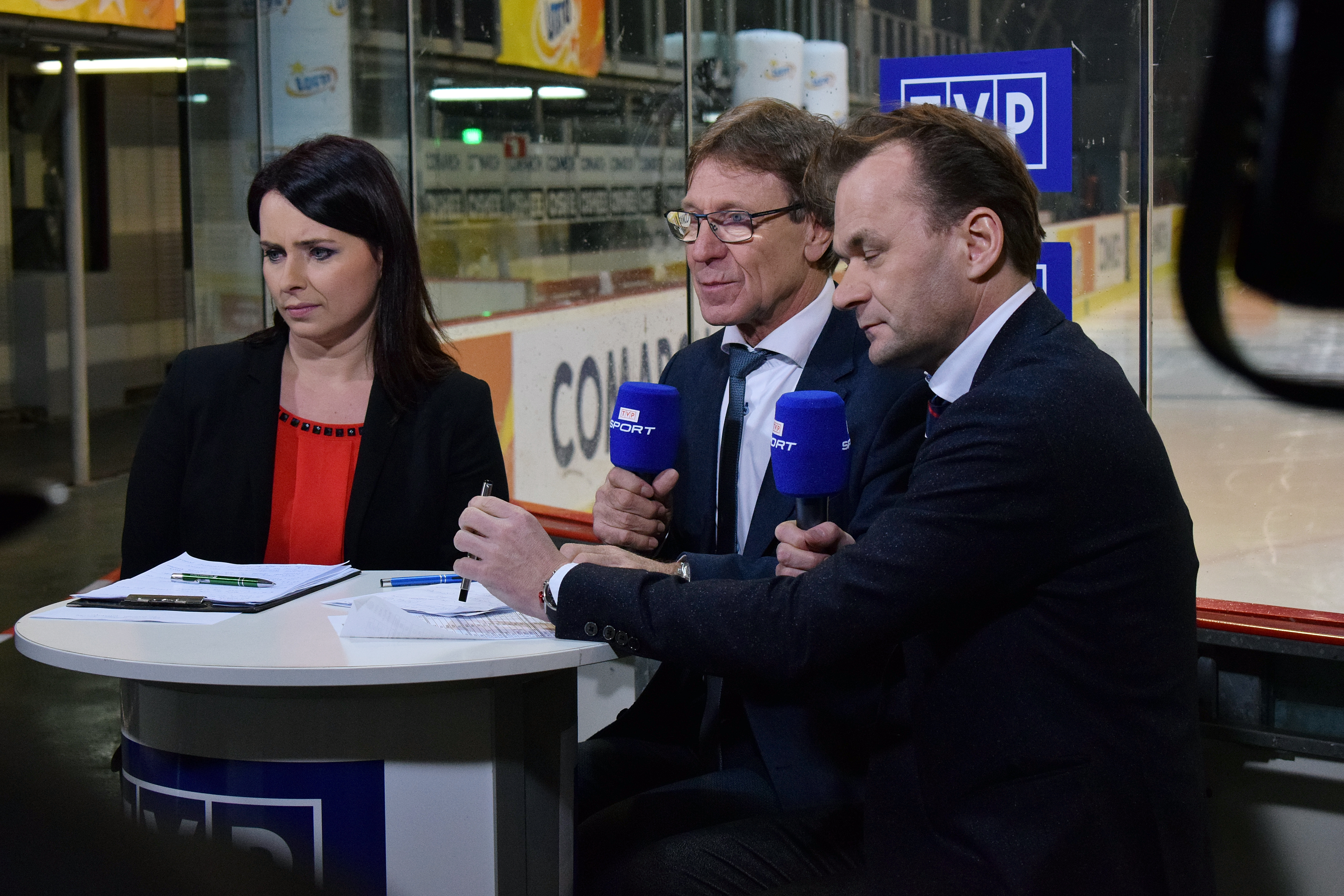 Olga Rybicka, Wiesław Jobczyk, Tomasz Rutkowski